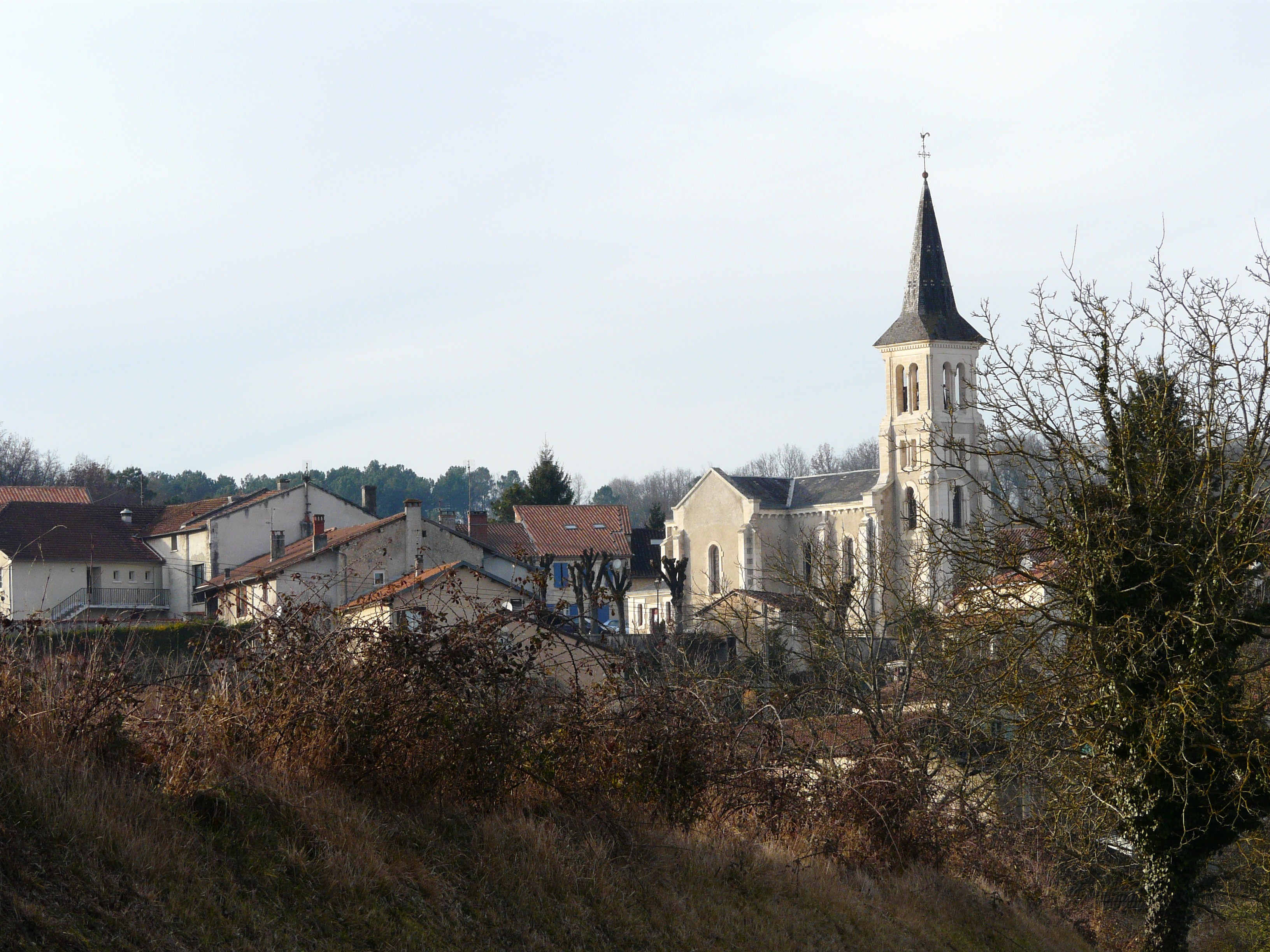 Le bourg de Léguillac-de-l'Auche, Dordogne, France